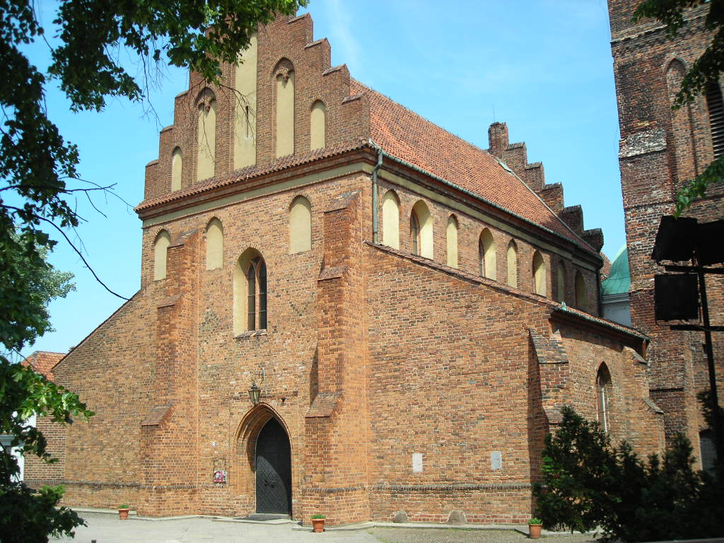 Kościół pw. Nawiedzenia Najświętszej Marii Panny w Warszawie